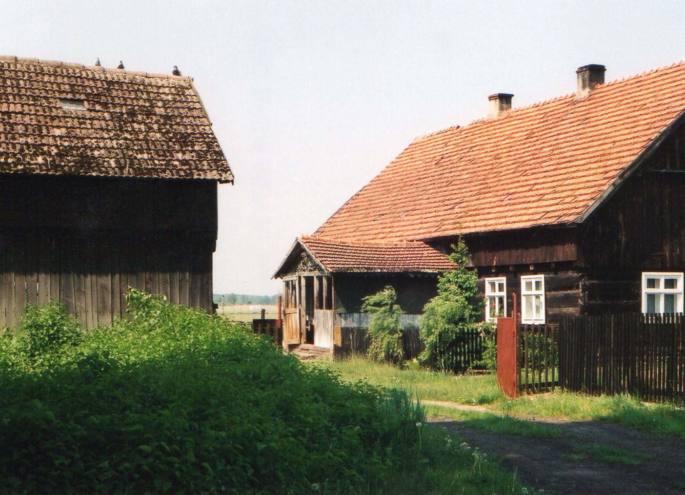 Osadnictwo olęderskie w rejonie Nowego Tomyśla i Jastrzębska oraz Paproci. Maj 2002r.